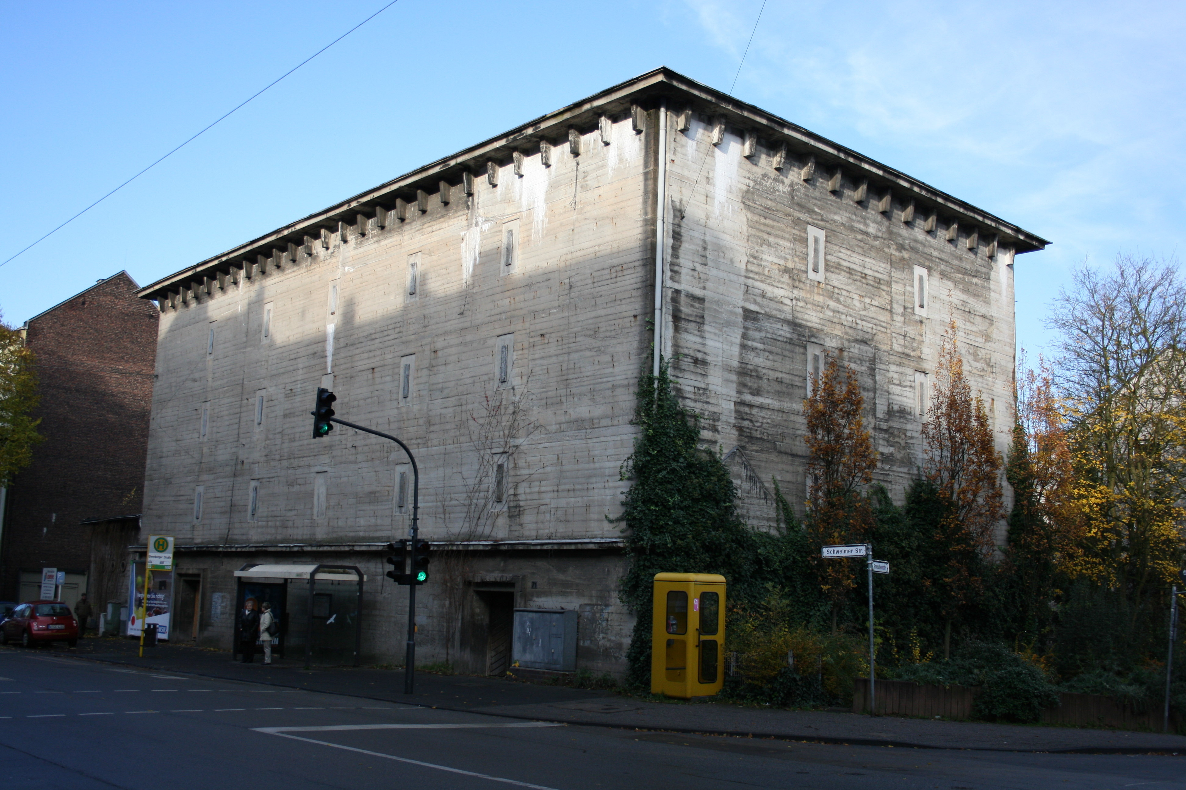 Bunker in Wuppertal-Langerfeld